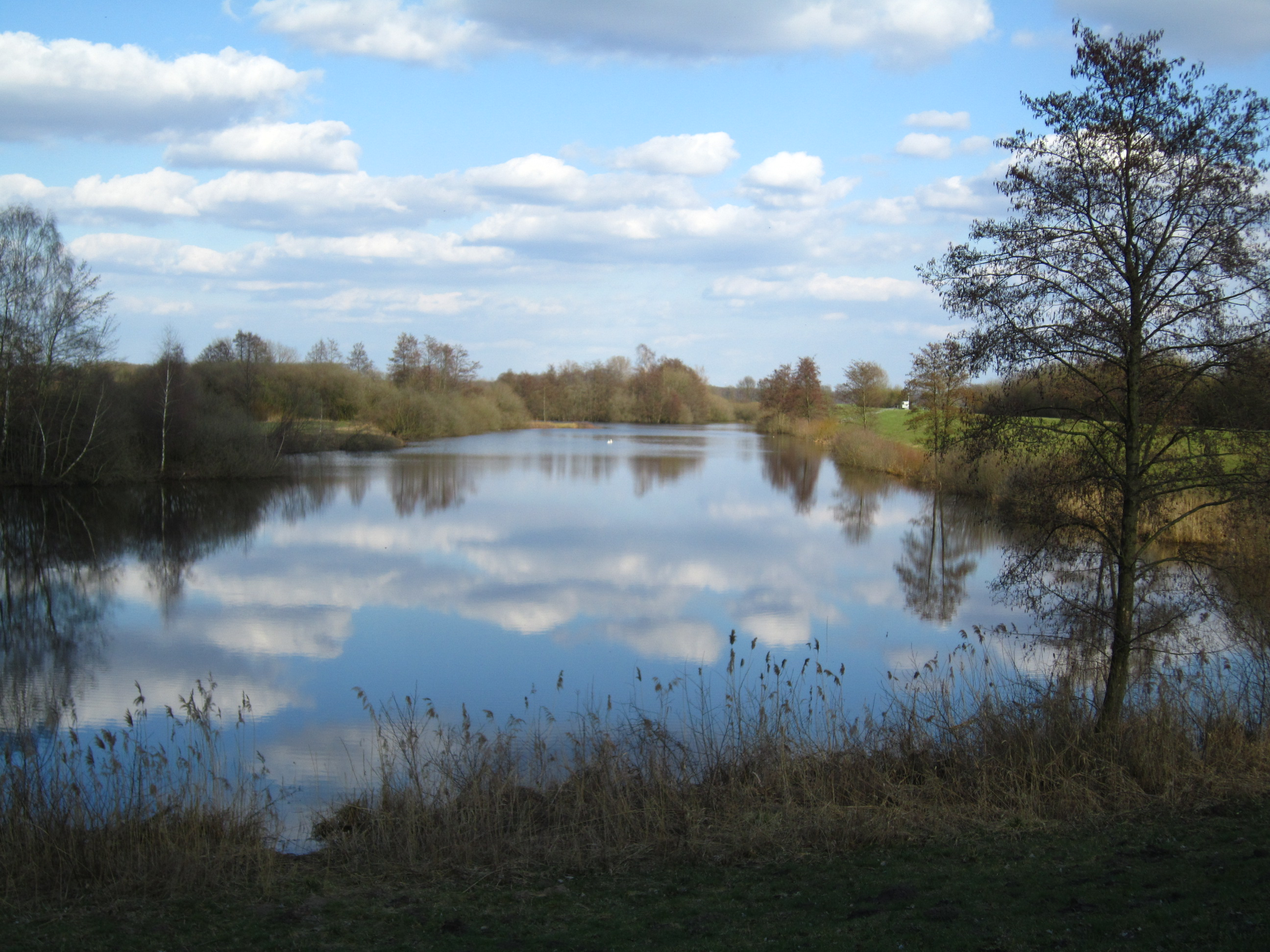 Lüscher Polder in der Gemeinde Bakum (Landkreis Vechta); Naturschutzgebiet „Polder Lüsche“